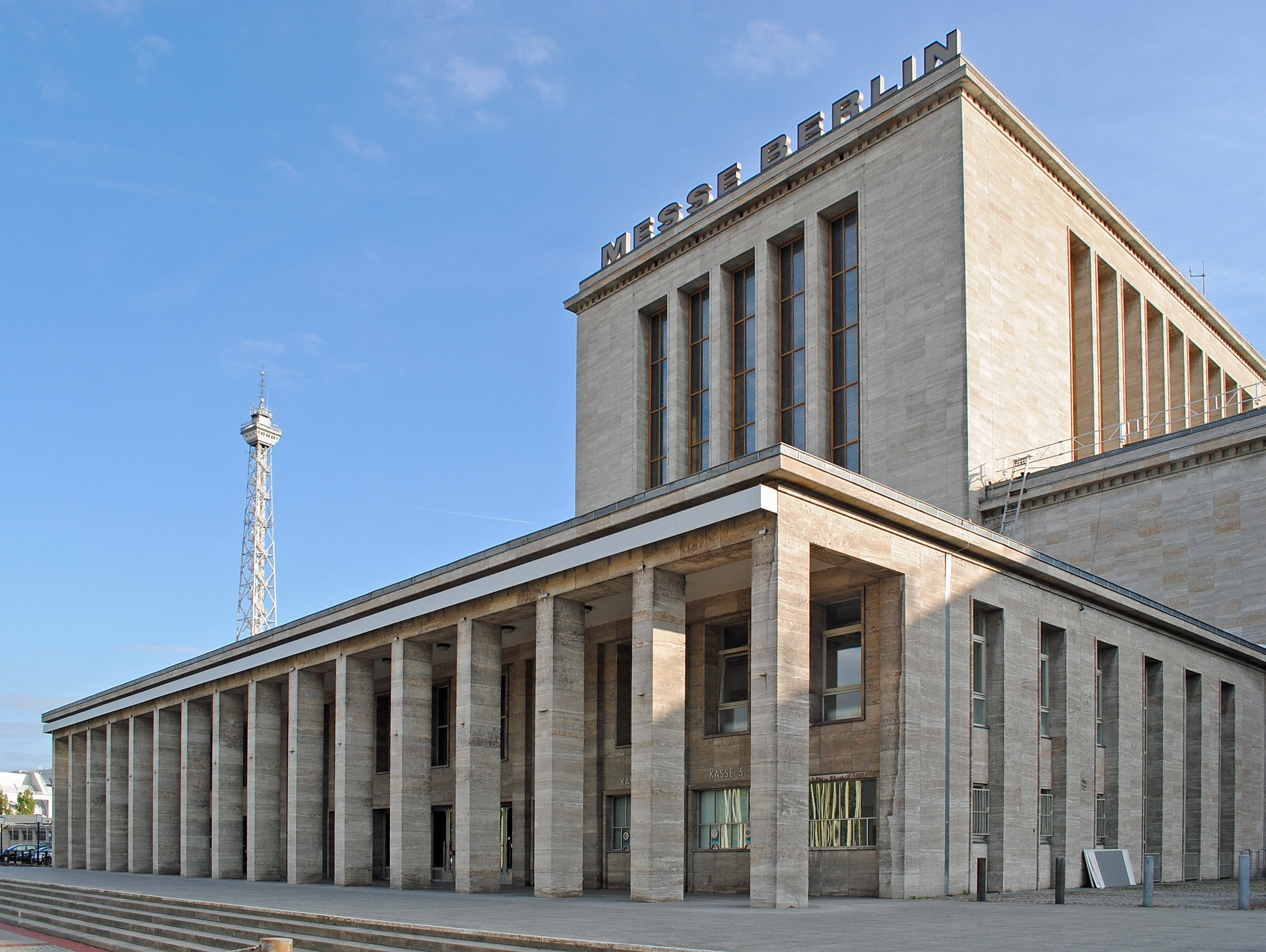 Eingangsbereich des Messegebäudes am Hammarskjöldplatz mit Funkturm im Hintergrund.Denkmal Nr. 09040498 Berliner Denkmalliste